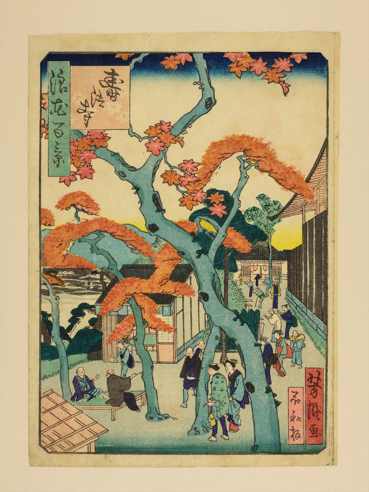 1800年代。里の家芳瀧/画。浪花百景 102枚のうちの1枚。大阪市立中央図書館蔵。